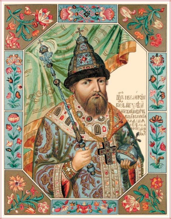 Aлексей Михайлович